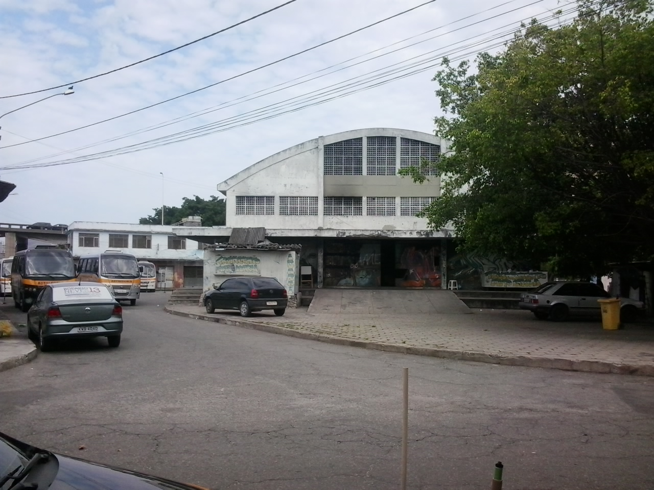 Antigo Entreposto de Pesca, atrás do antigo Mercado Municipal de Niterói